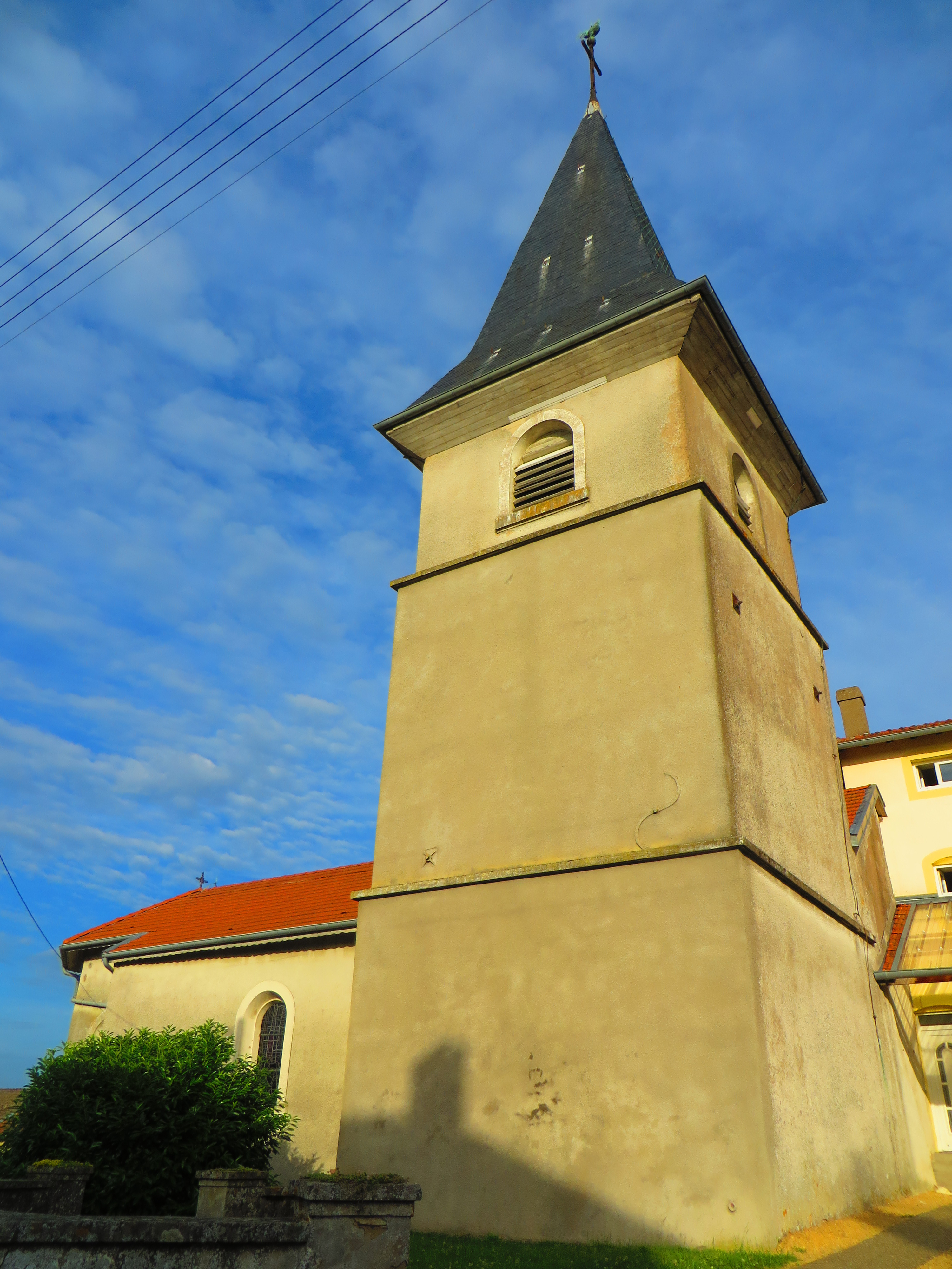 Morville Vic eglise